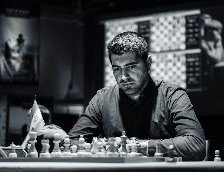 امیررضاپوررمضانعلی